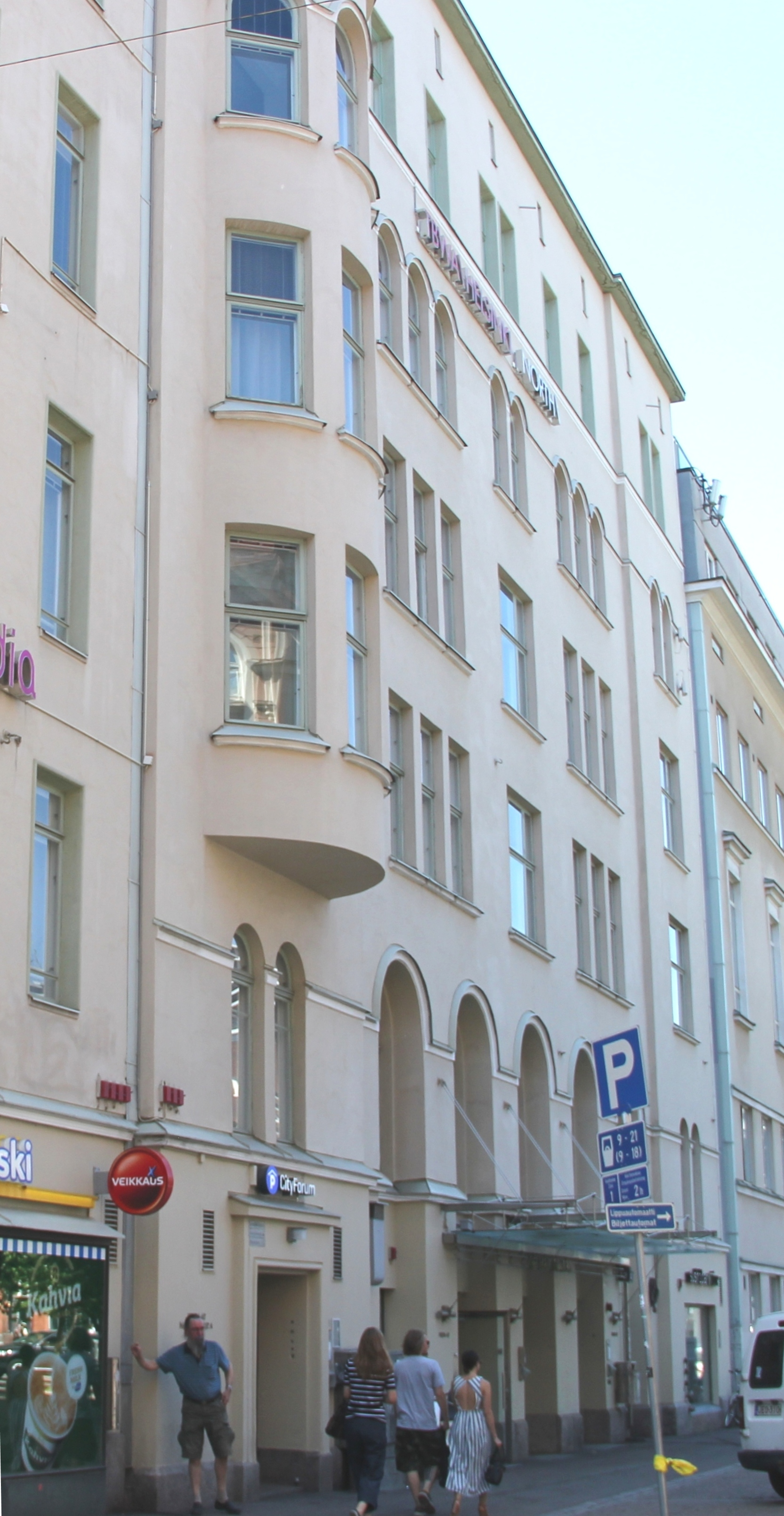 Suomen Luterilaisen Evankeliumiyhdistyksen talo, Malminkatu 12, Helsinki